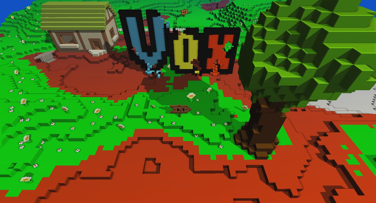 Vox Game Logo